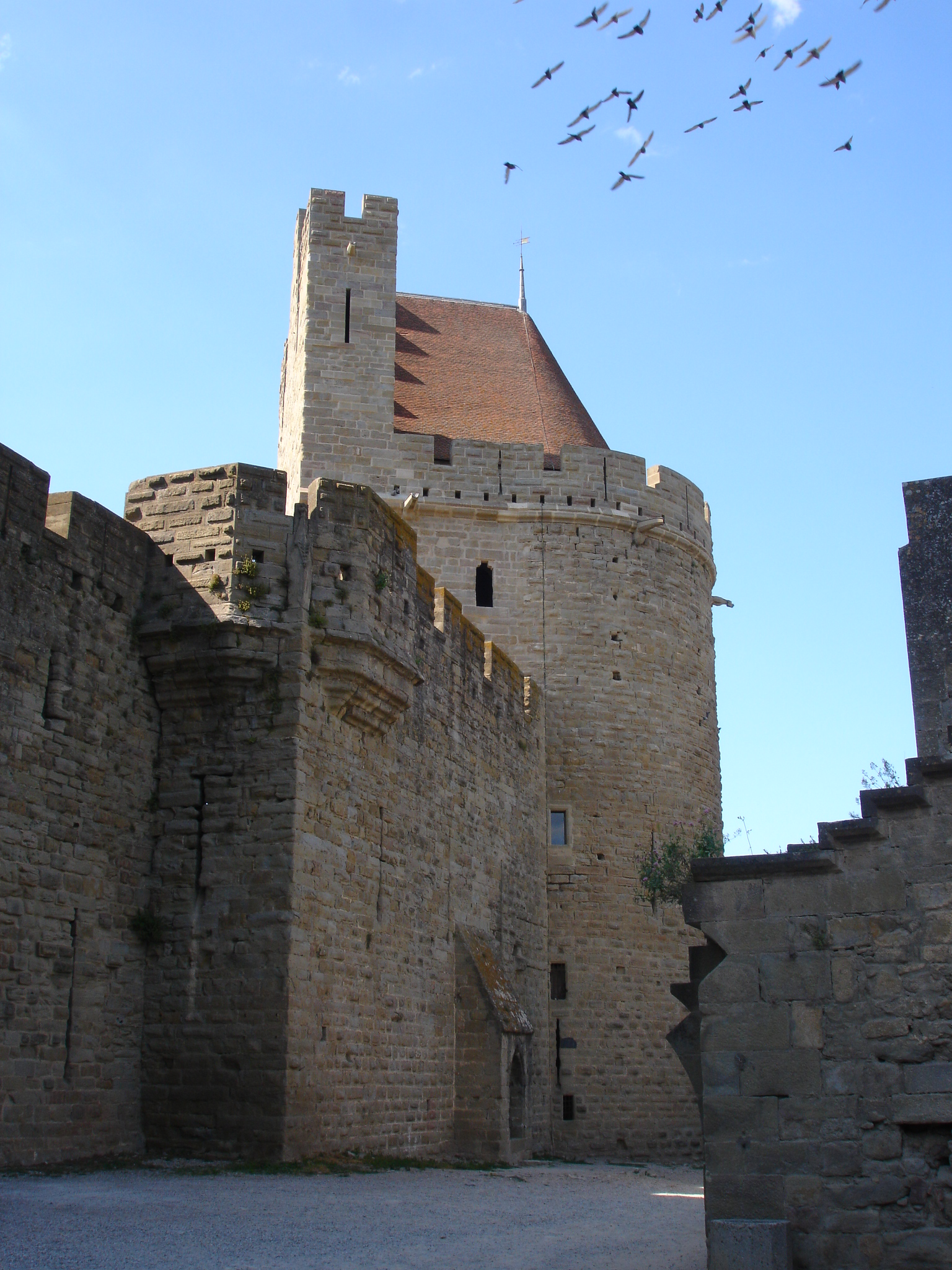 France, Aude (11), Carcassonne, tour du Tréseau